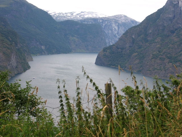 Fjord at Aurland